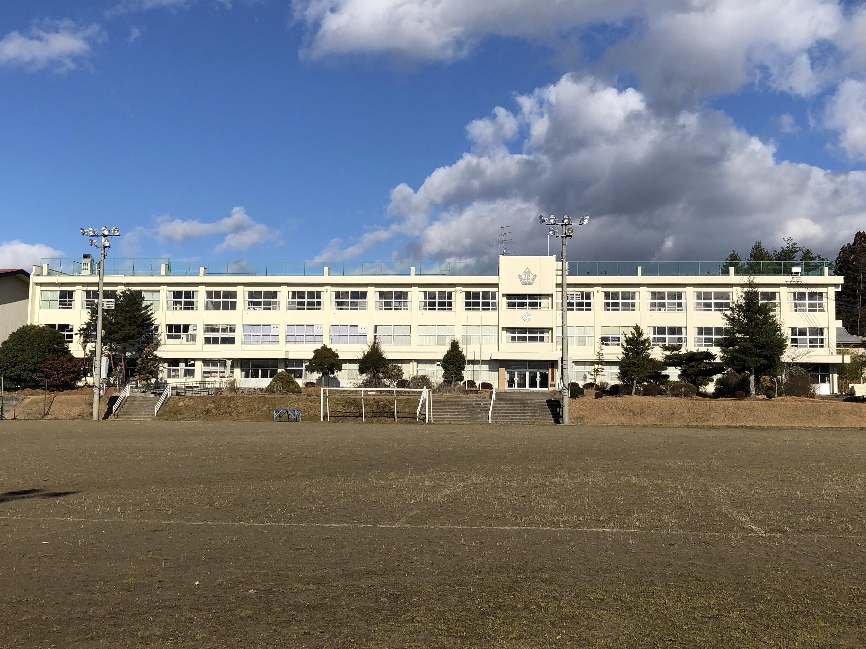 仙台市立根白石中学校 校舎全景